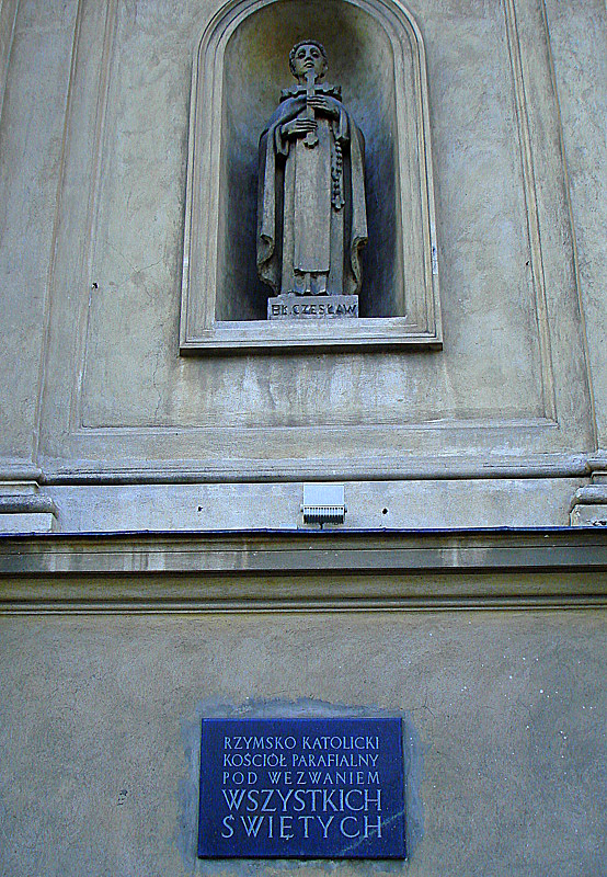 Warszawa, rzeźba błogosławionego Cesława na fasadzie kościoła pw. Wszystkich Świętych